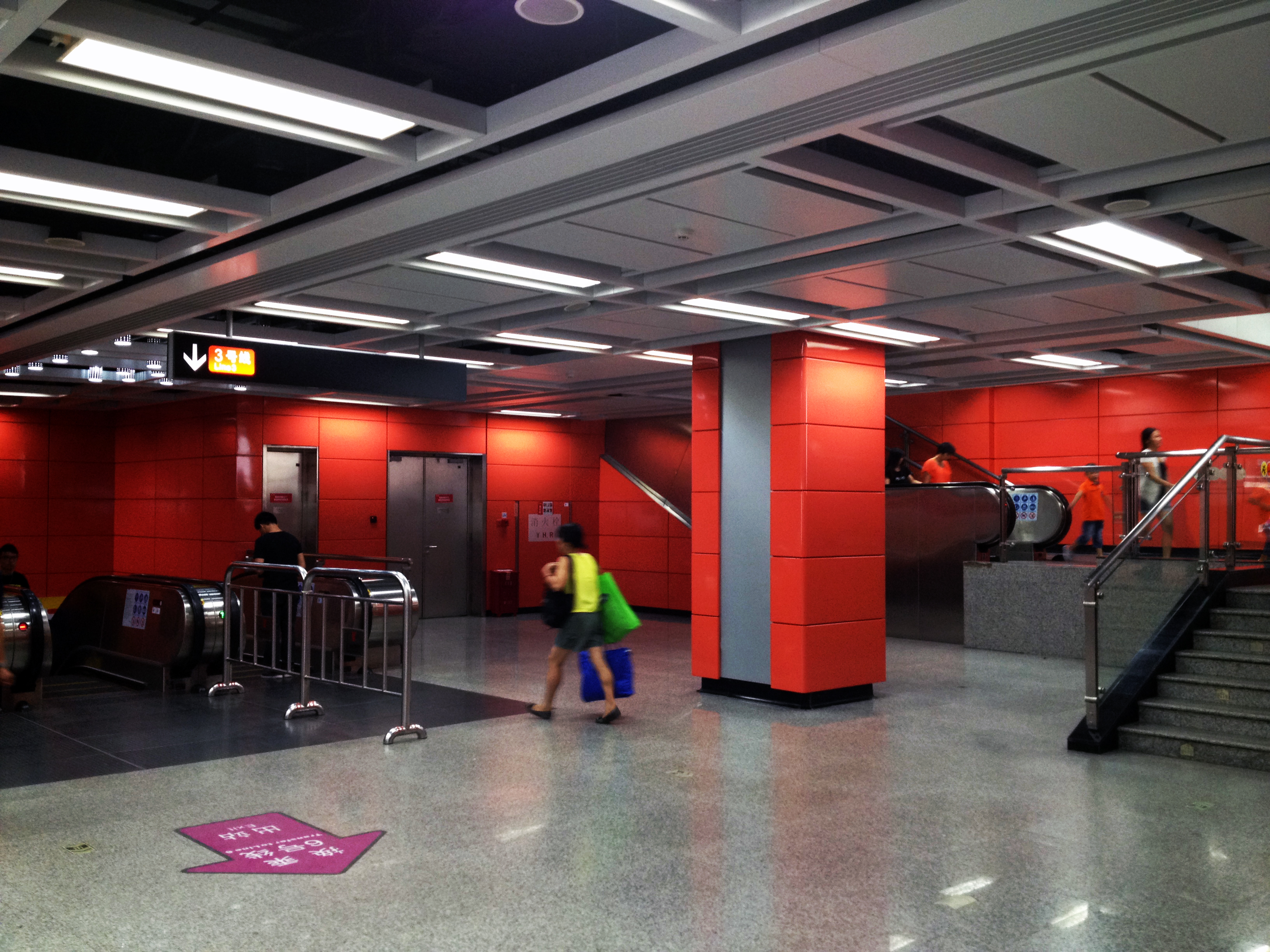 广州地铁燕塘站换乘层